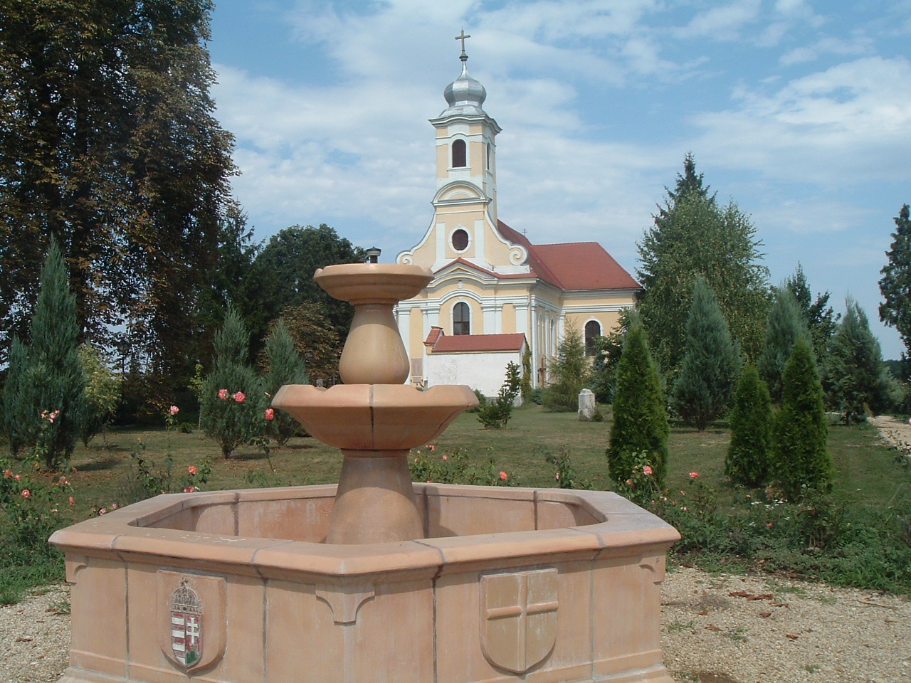 Csákánydoroszló